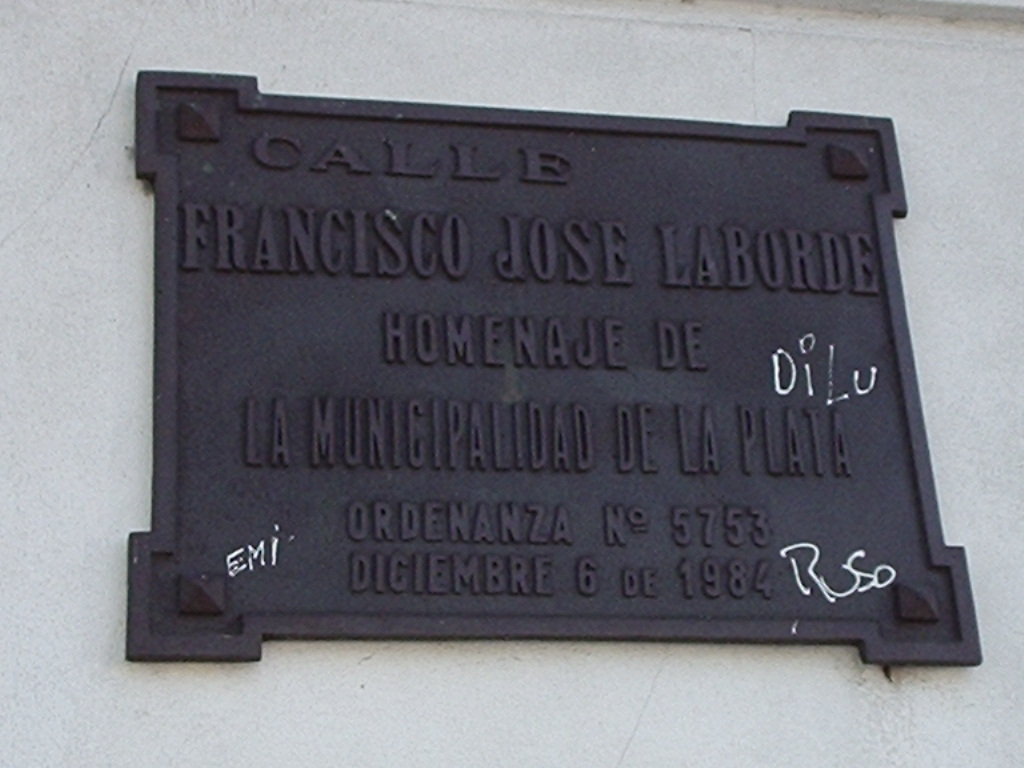 Placa en homenaje a Francisco José Laborde (1902-1975). Tolosa, Prov. de Buenos Aires.